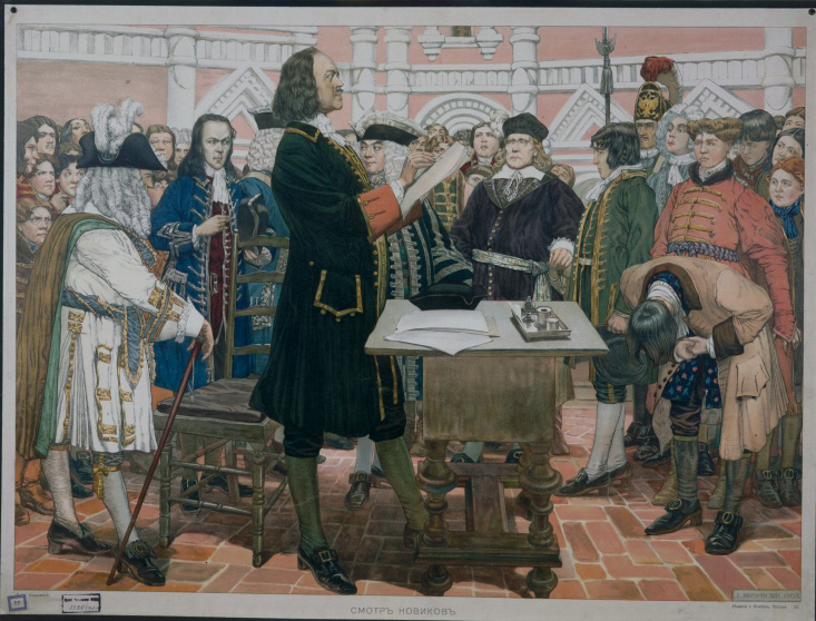 Картины по русской истории. Д.Н. Кардовский. Смотр новиков